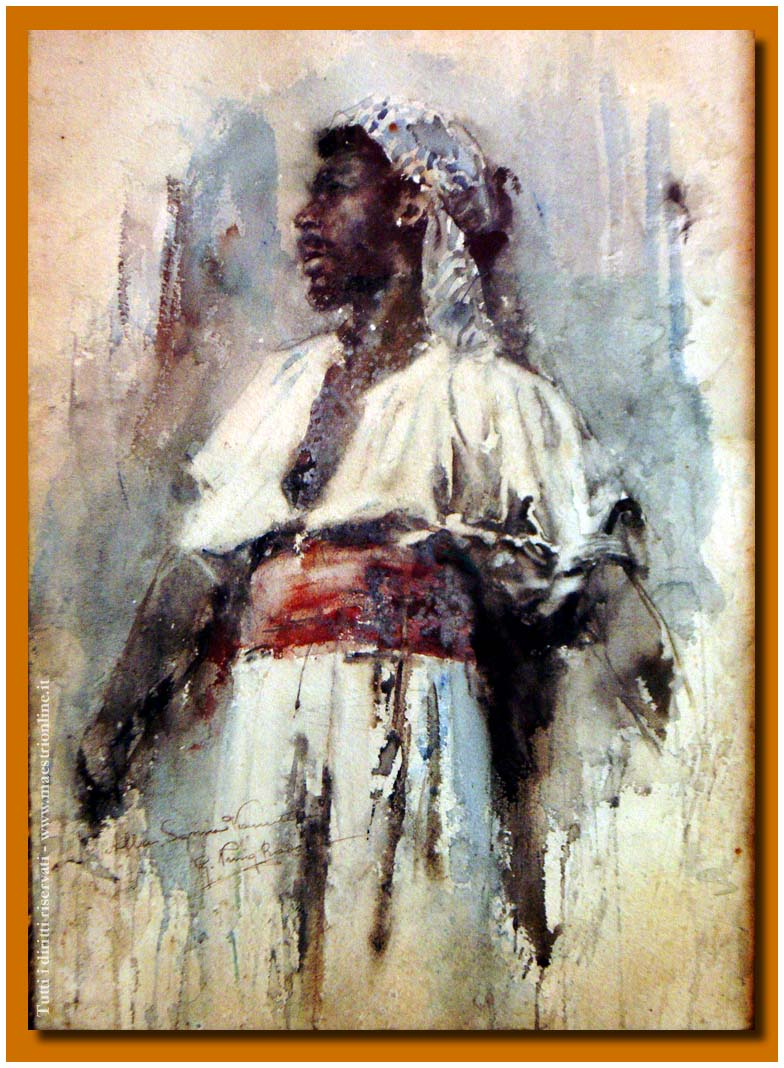 Tipus amb vestit àrab. Col·lecció particular, Roma.